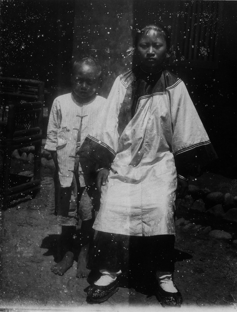 埔里の平埔。ポリ蕃の姉と弟。埔里社の地名はこの族に由来。純粋のもの4人のみ。